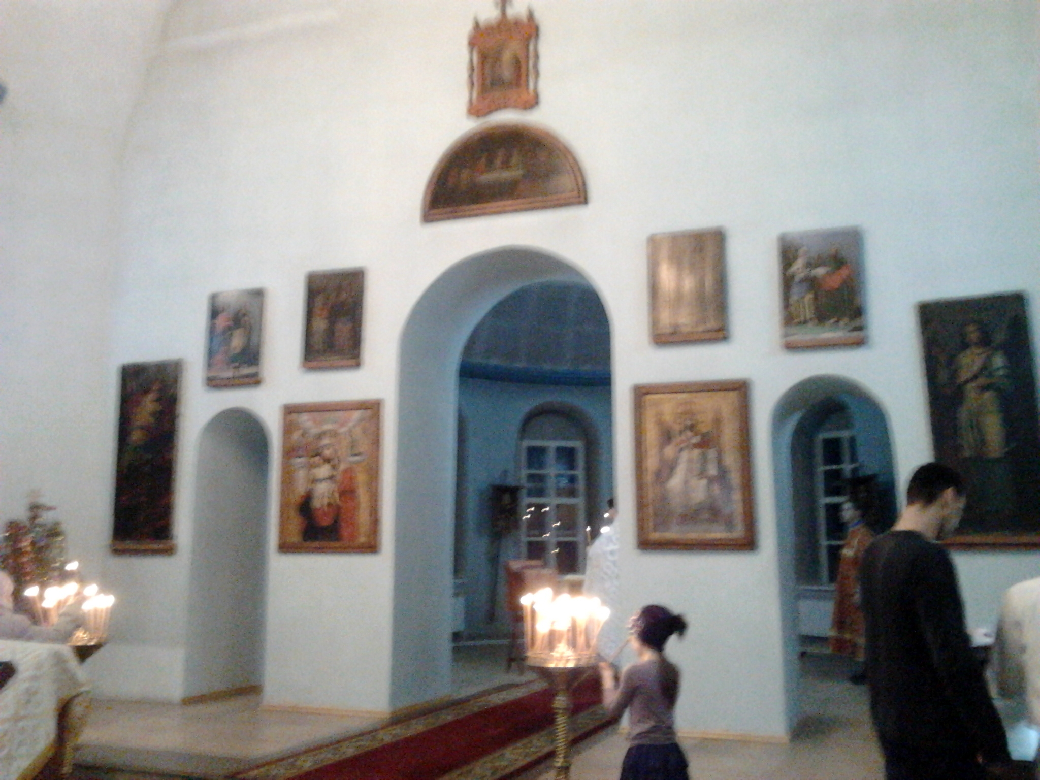 Нижняя Добринка (Жирновский район)